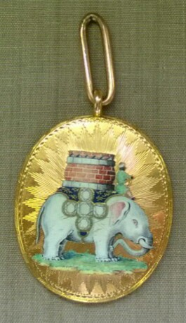 Medalion Orderu Słonia